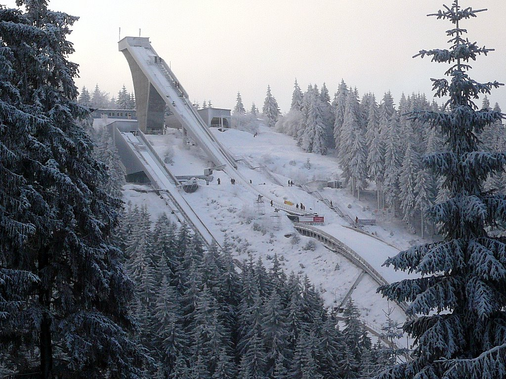 Schanzenanlage im Kanzlersgrund bei Oberhof, Anlauftürme